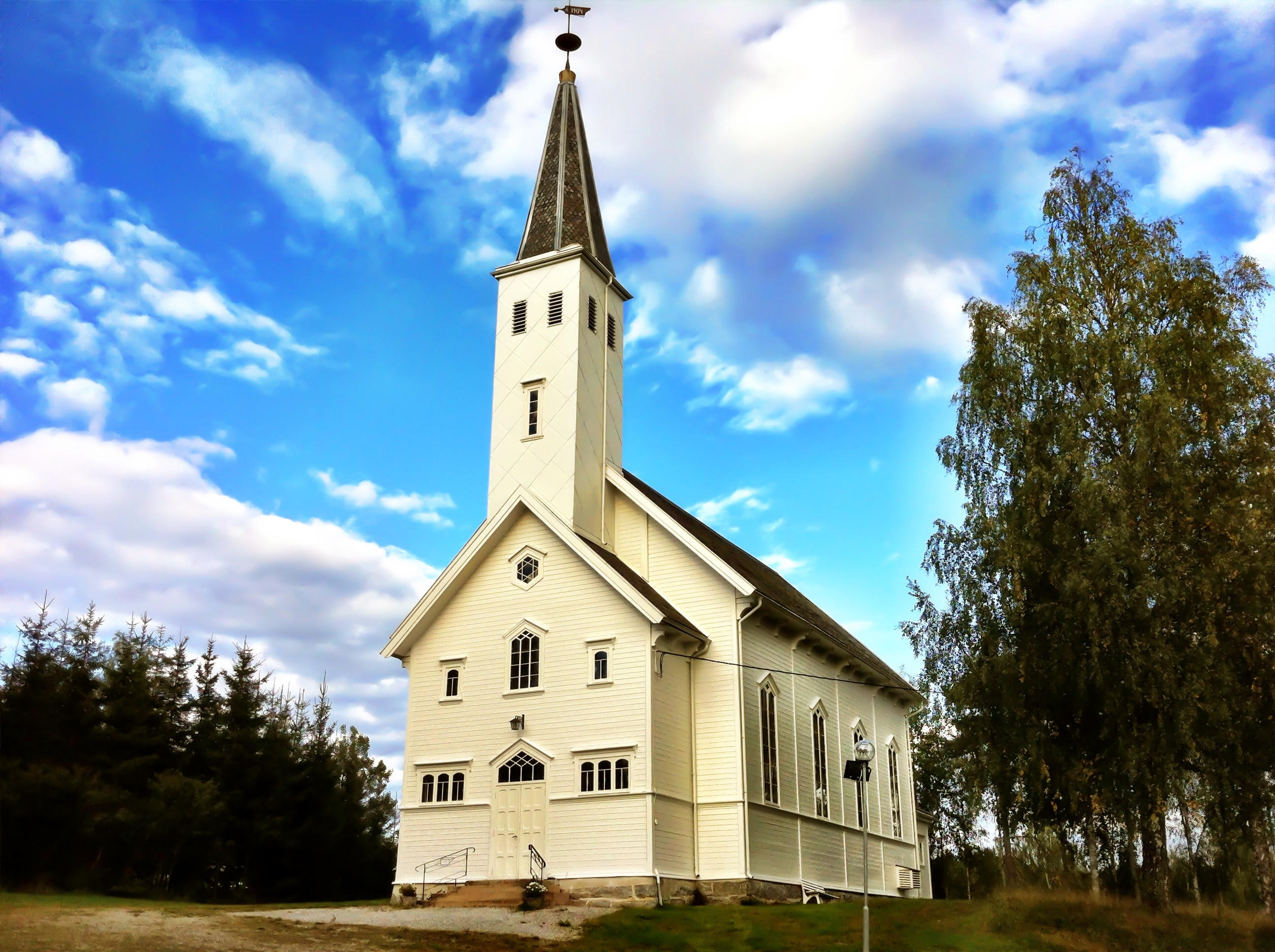 Ingeborgrud kirkested /NES(Akershus) 1900-tallet,første kvartal Wiki Loves Monuments 2012 Monument Norge Pic ble tatt med iPhone og redigert med Instagram.